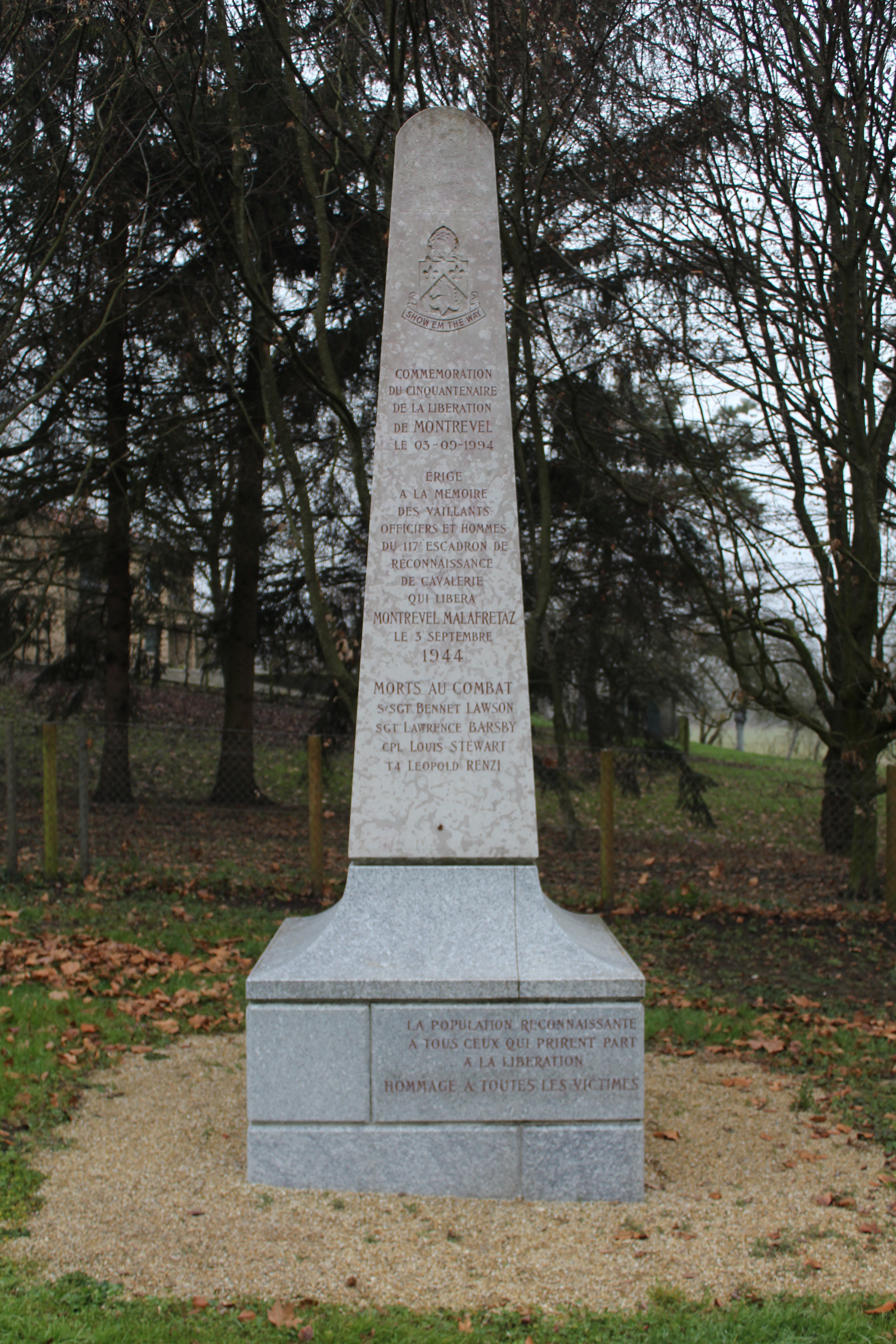 Stèle des Américains à Montrevel-en-Bresse.